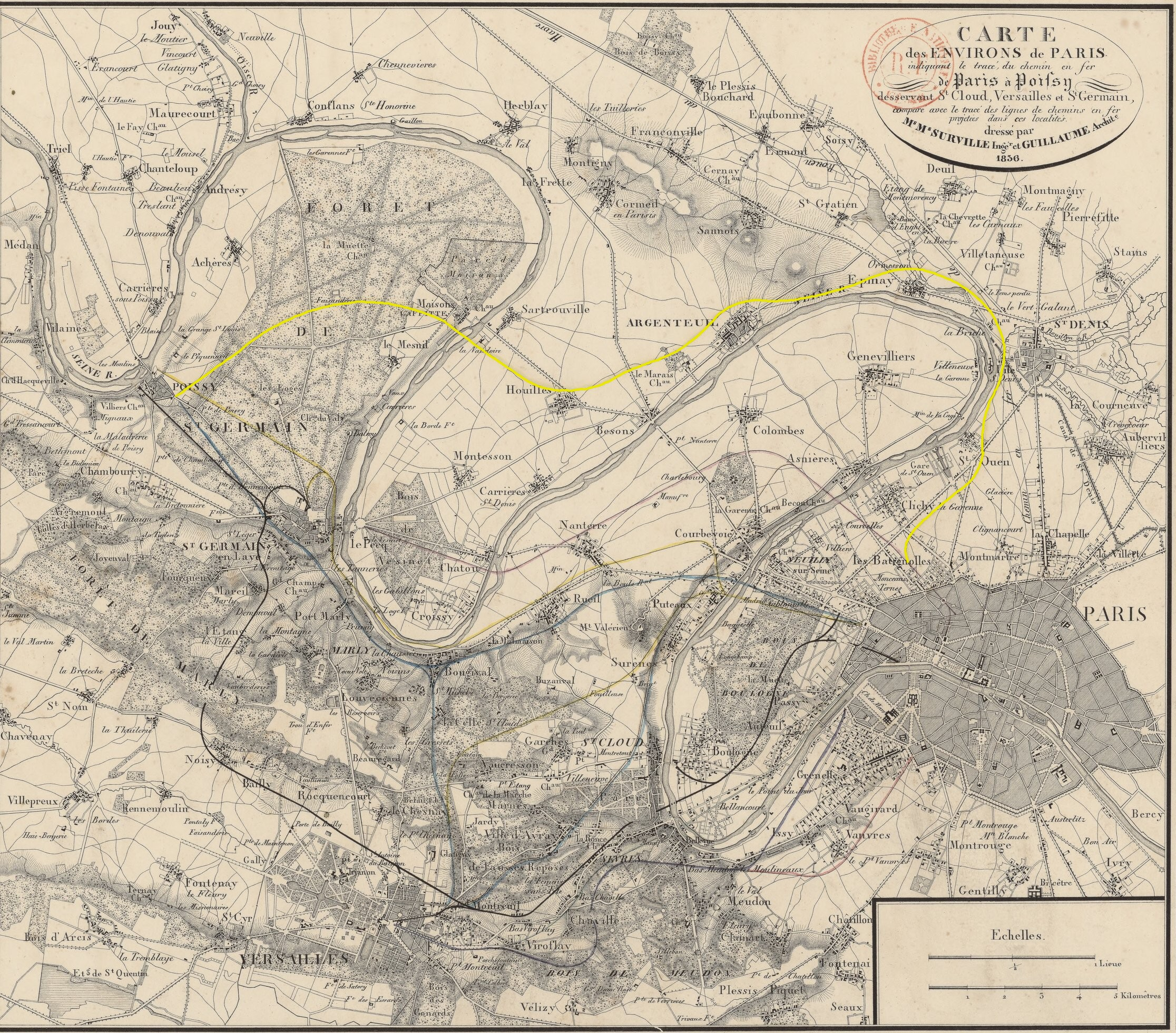 Carte des environs de Paris, indiquant le tracé du chemin de fer de Paris à Poissy, desservant St-Cloud, Versailles et St-Germain, comparé avec le tracé des lignes de chemins de fer projetés dans ces localités. Dressée par MM Surville ingénieur et Guillaume architecte 1836 (extrait)